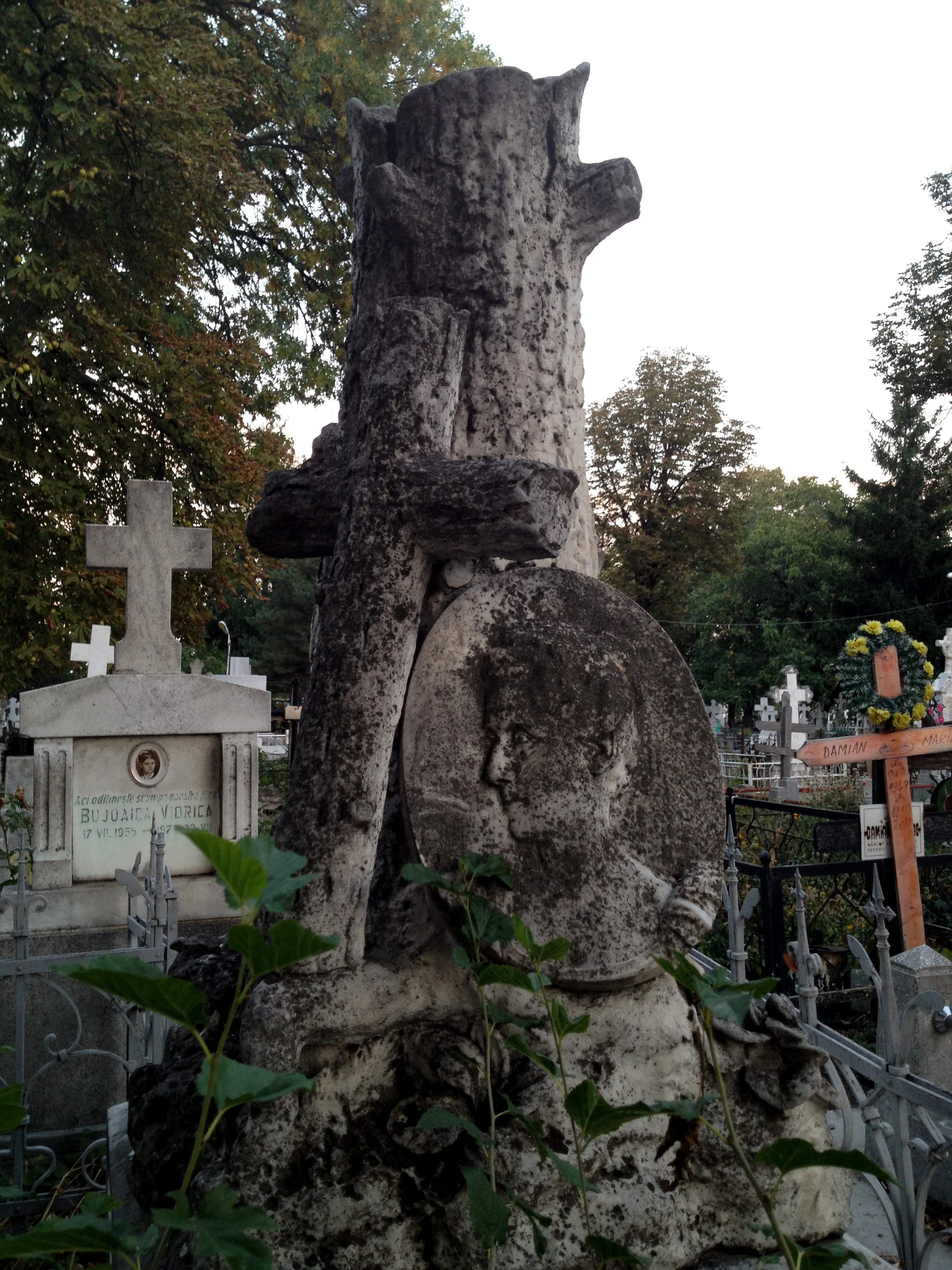 Basorelief Elena Cardaș